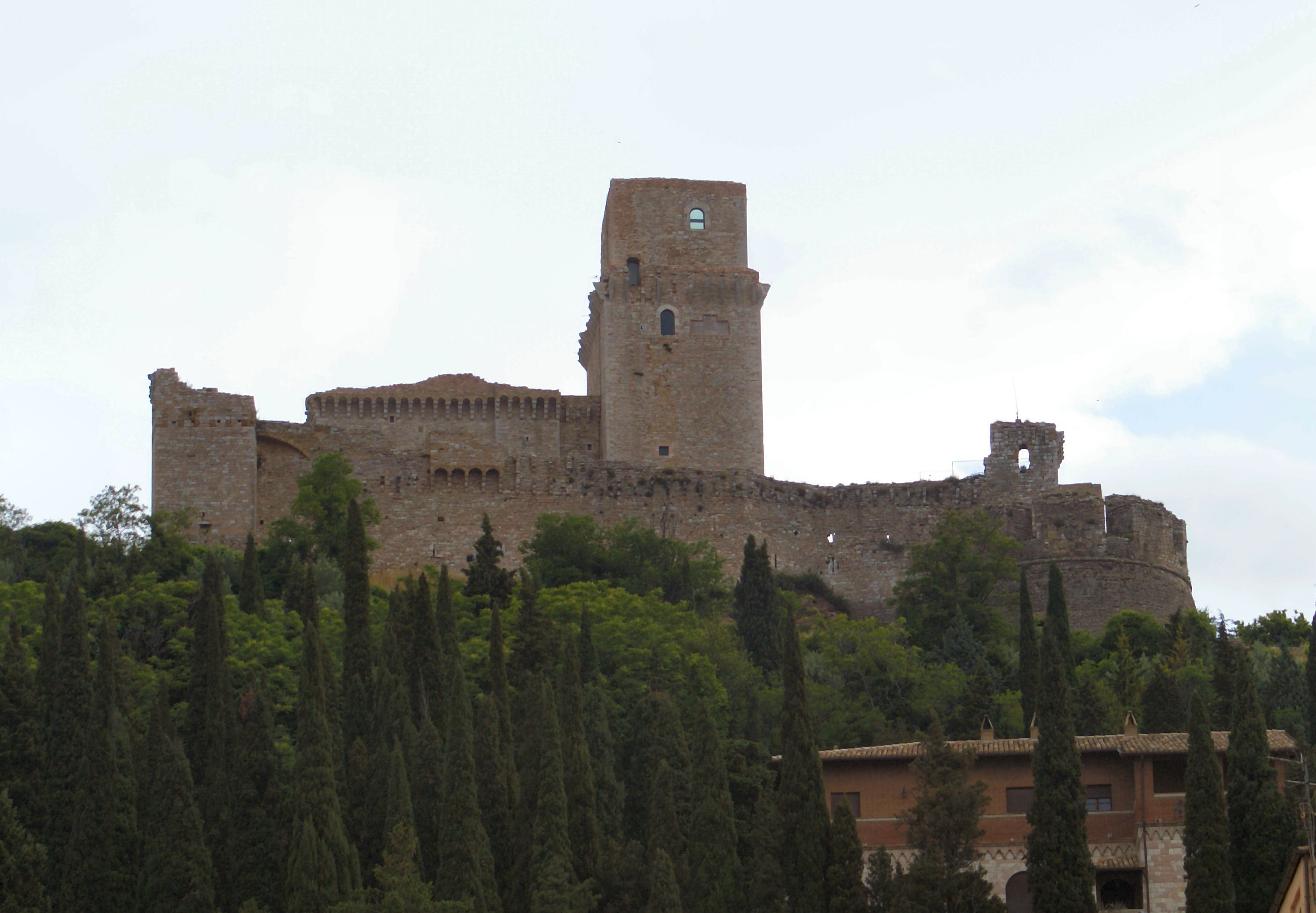 Assisi Rocca Maggiore